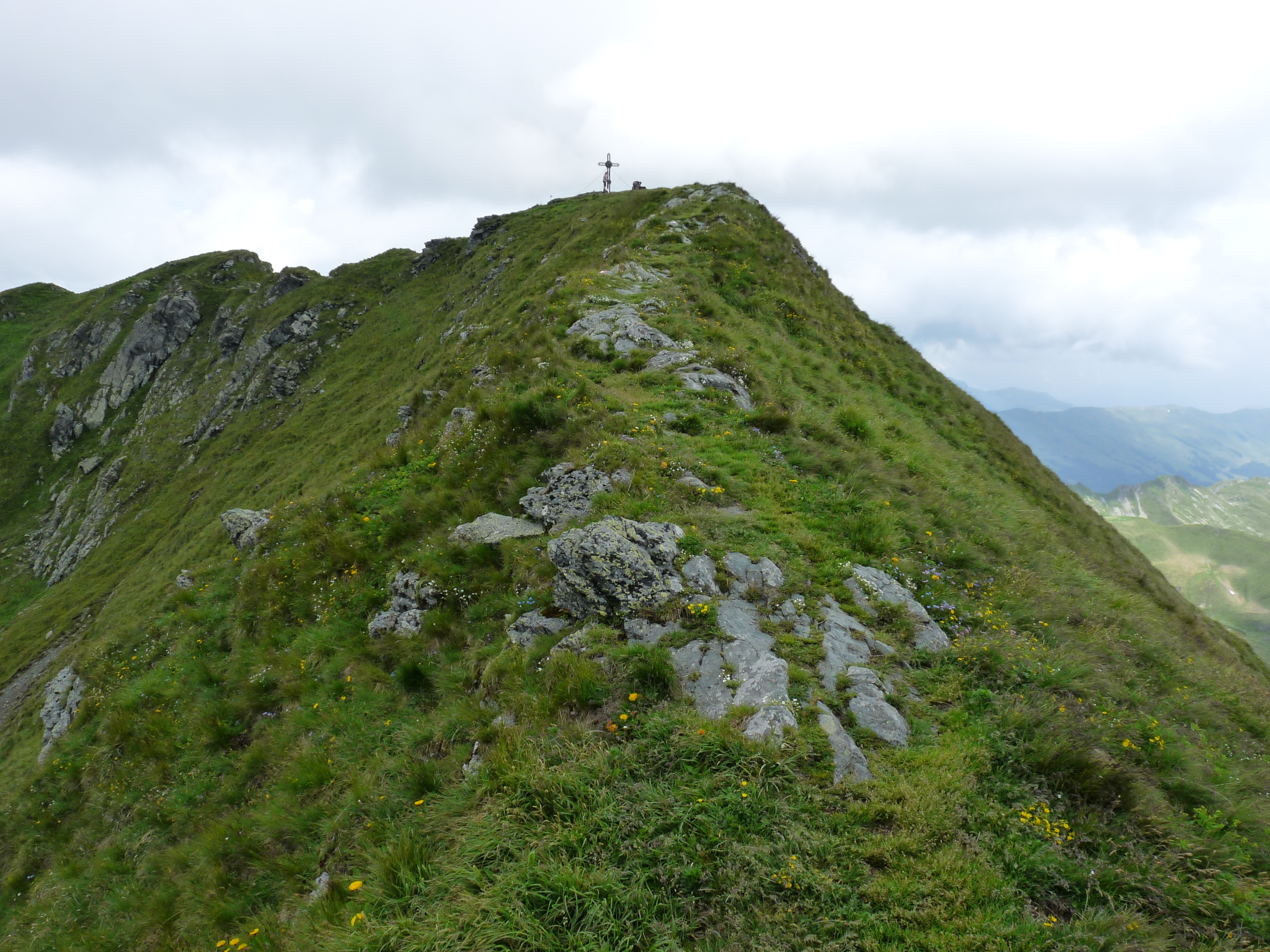 Der Geißstein auf der Grenze der österreichischen Bundesländer Salzburg und Tirol